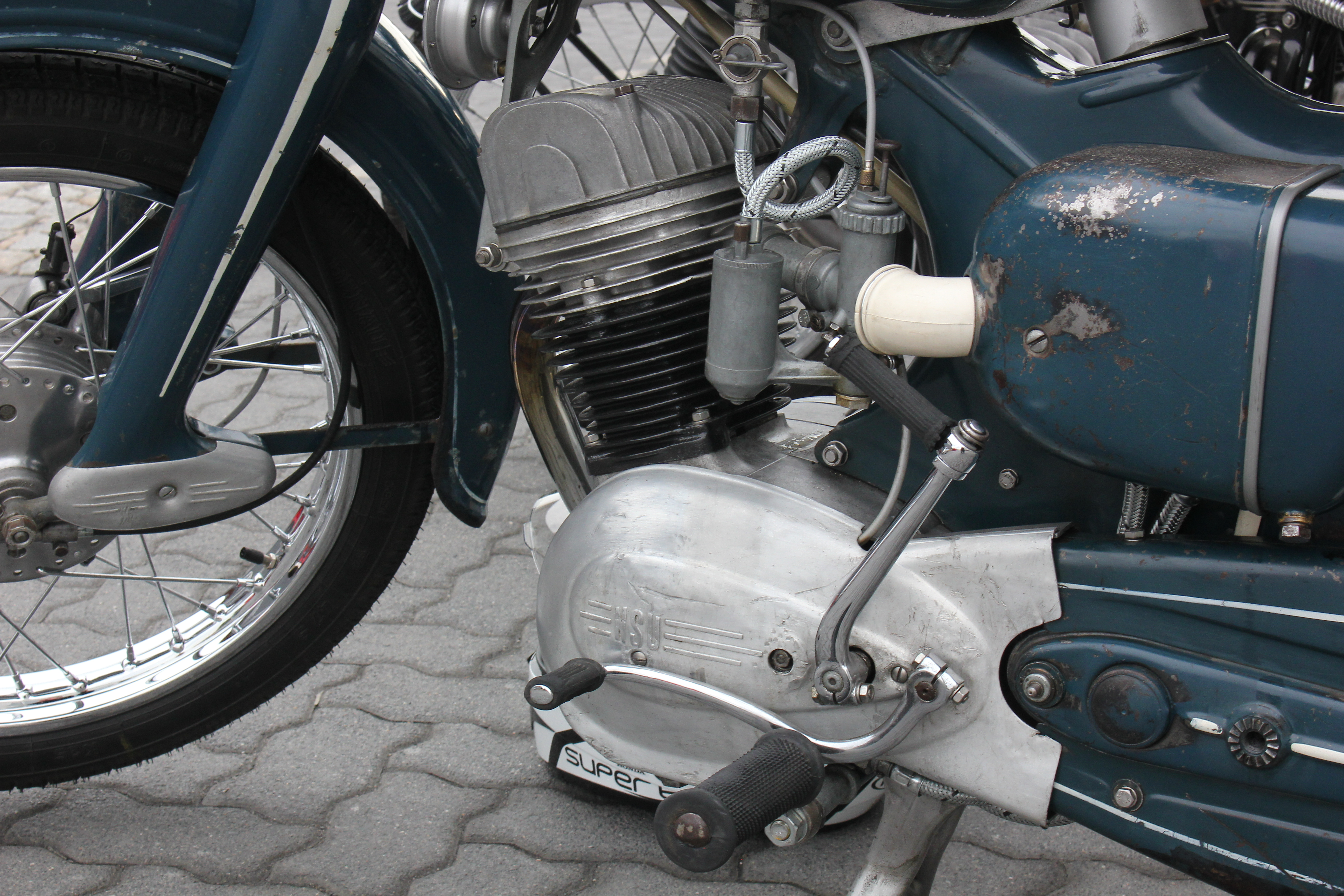 Engine of NSU Superfox, Typ 125 OSB, Baujahr 1956, Fg.-Nr. 2110313, 1-Zylinder-Viertaktmotor, 8,8 PS bei 6500/min, Höchstgeschwindigkeit 95 km/h, 15.530 Stück gebaut (Bauzeit 1955–57), bei der ADAC Moselschiefer-Classic in Mayen